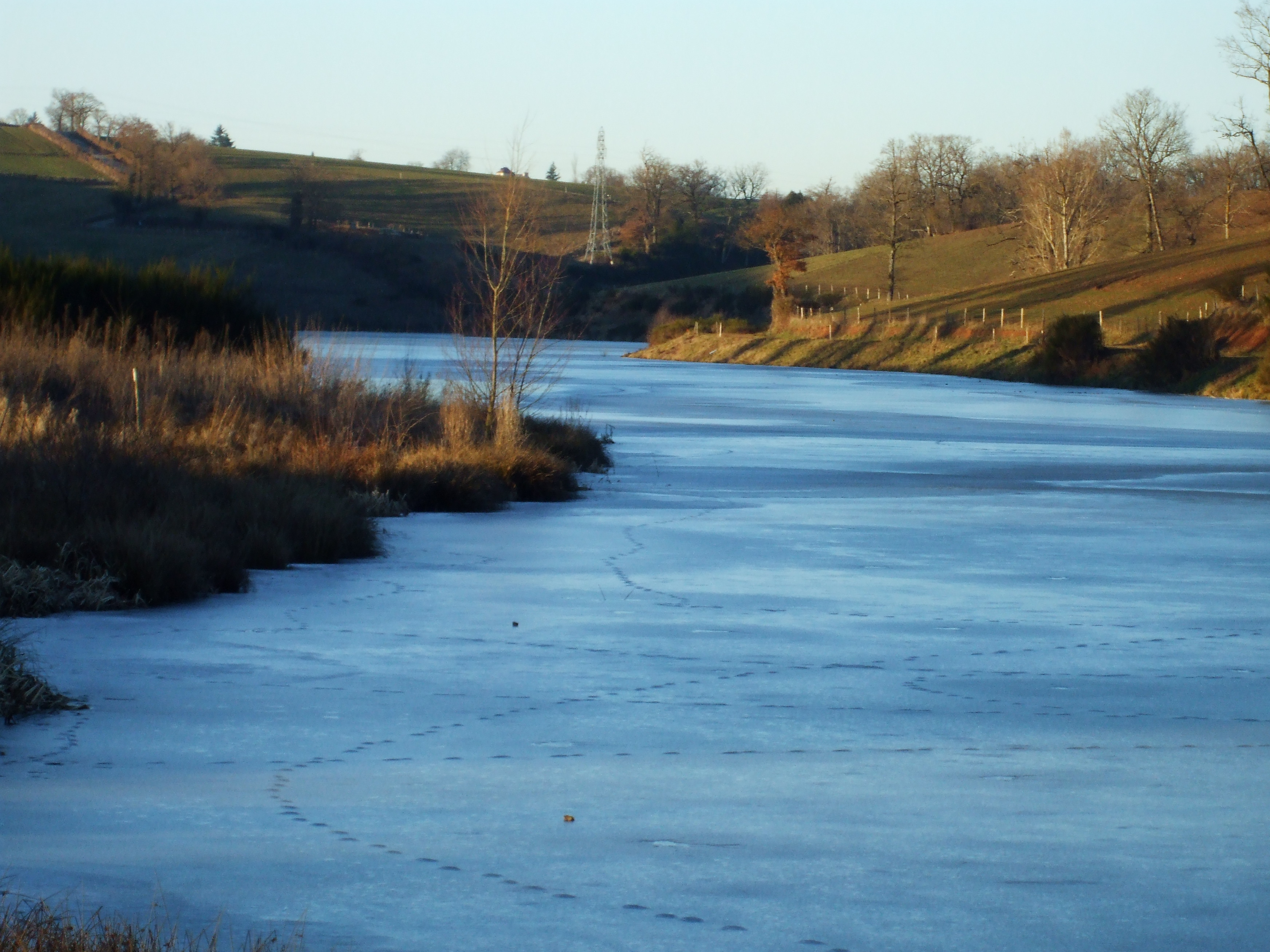 Lac de Planèze gelé, hiver 2008.